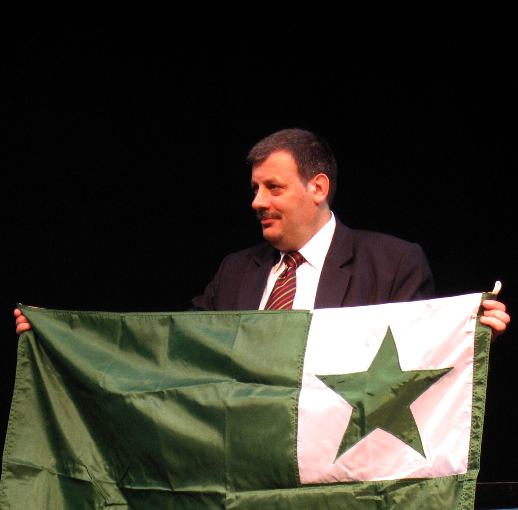 Povilas Jegorovas Pasaulinio esperantininkų kongreso Vilniuje metu (2005)